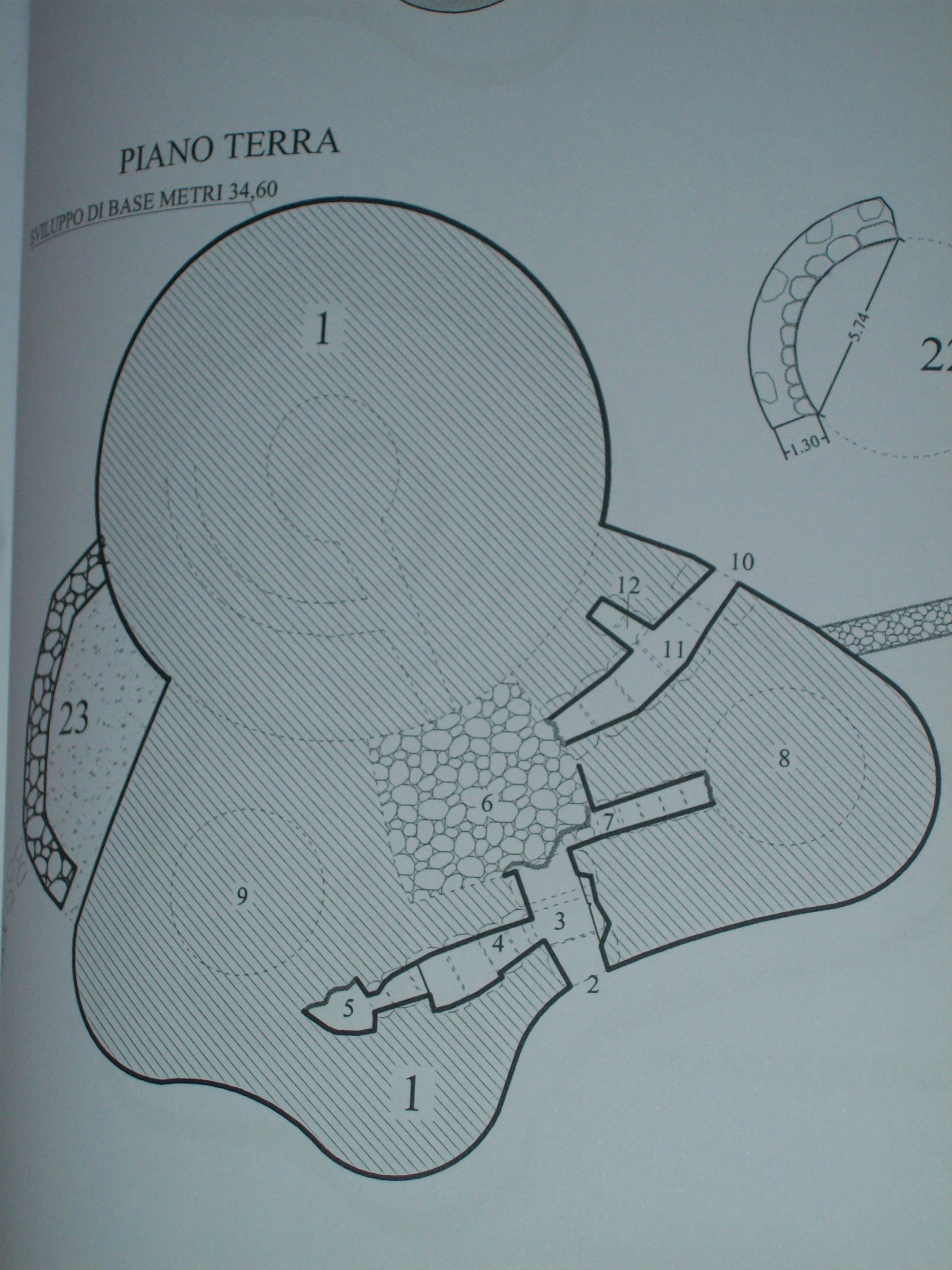 Nuraghe Oes - Piano terra